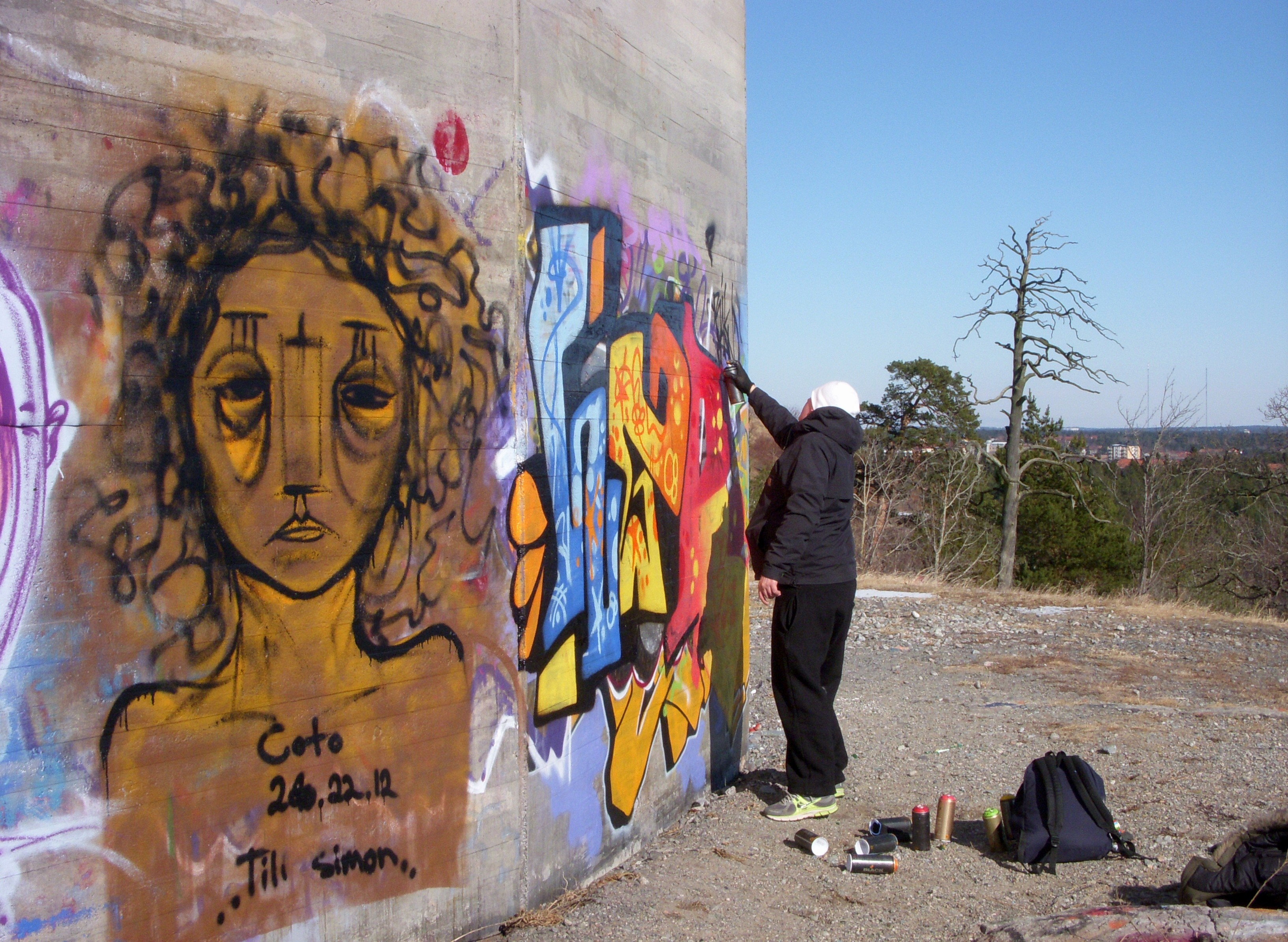 Graffiti på Högdalstoppens vattenreservoar